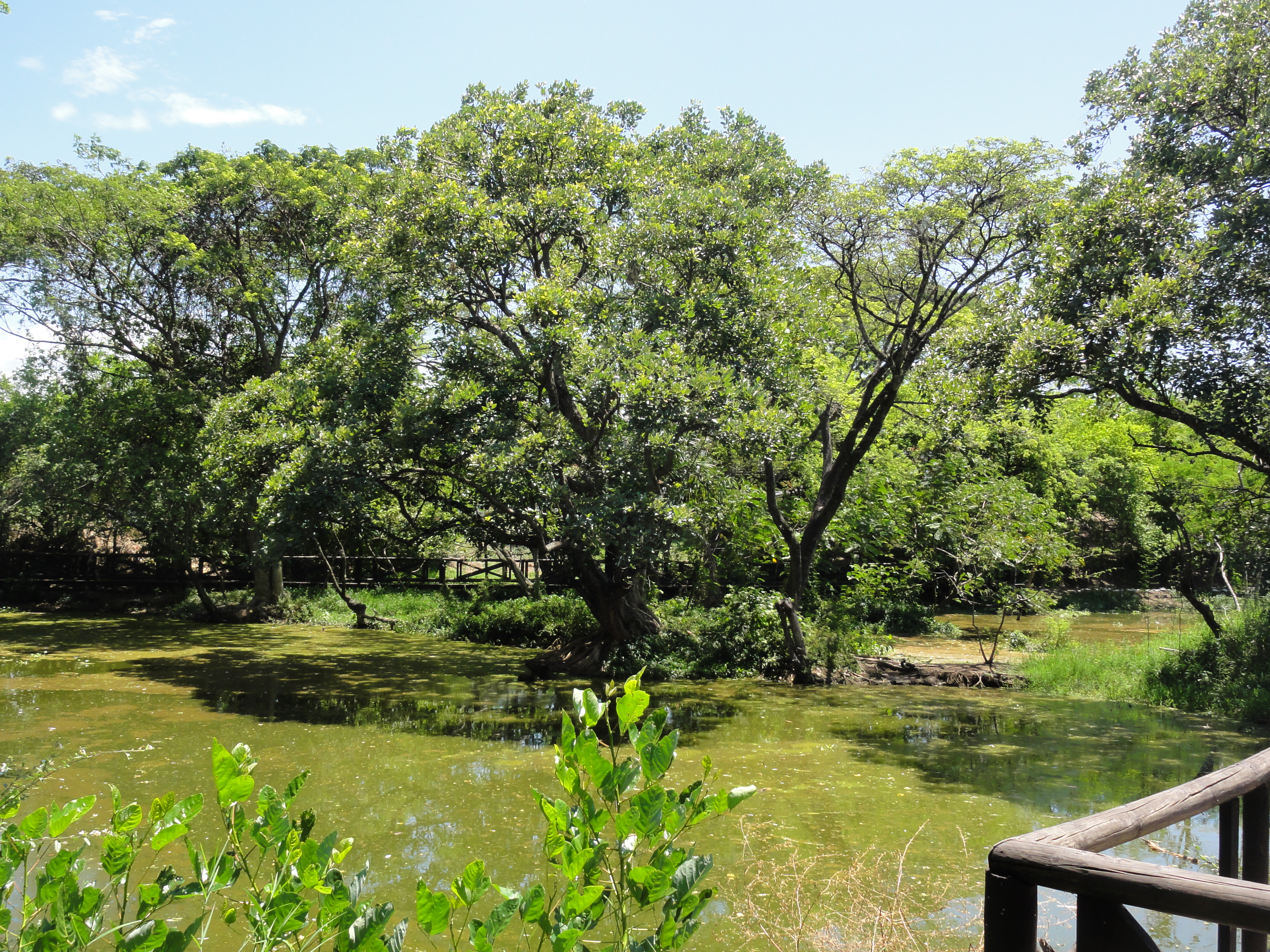 Parque Ecológico Humedal El Samán, Parque de la Salud (3). Cartago, Valle, Colombia.